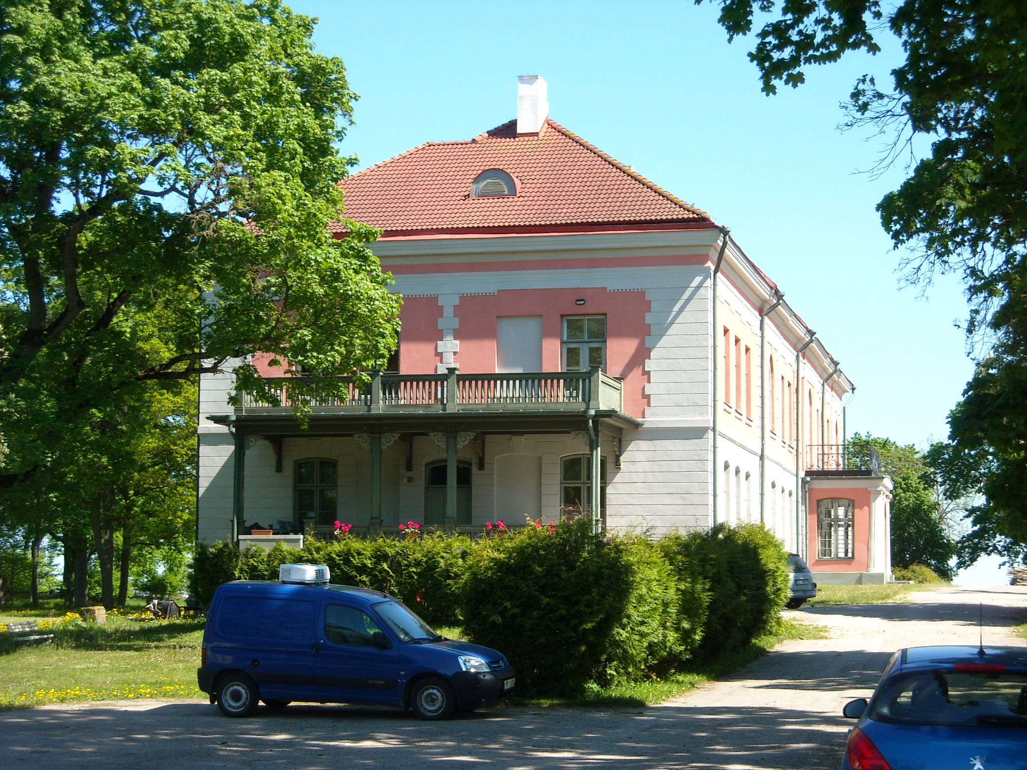 Rägavere mõisa peahoone